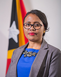 Elvina Sousa Carvalho, Abgeordnete des Nationalparlaments Osttimors